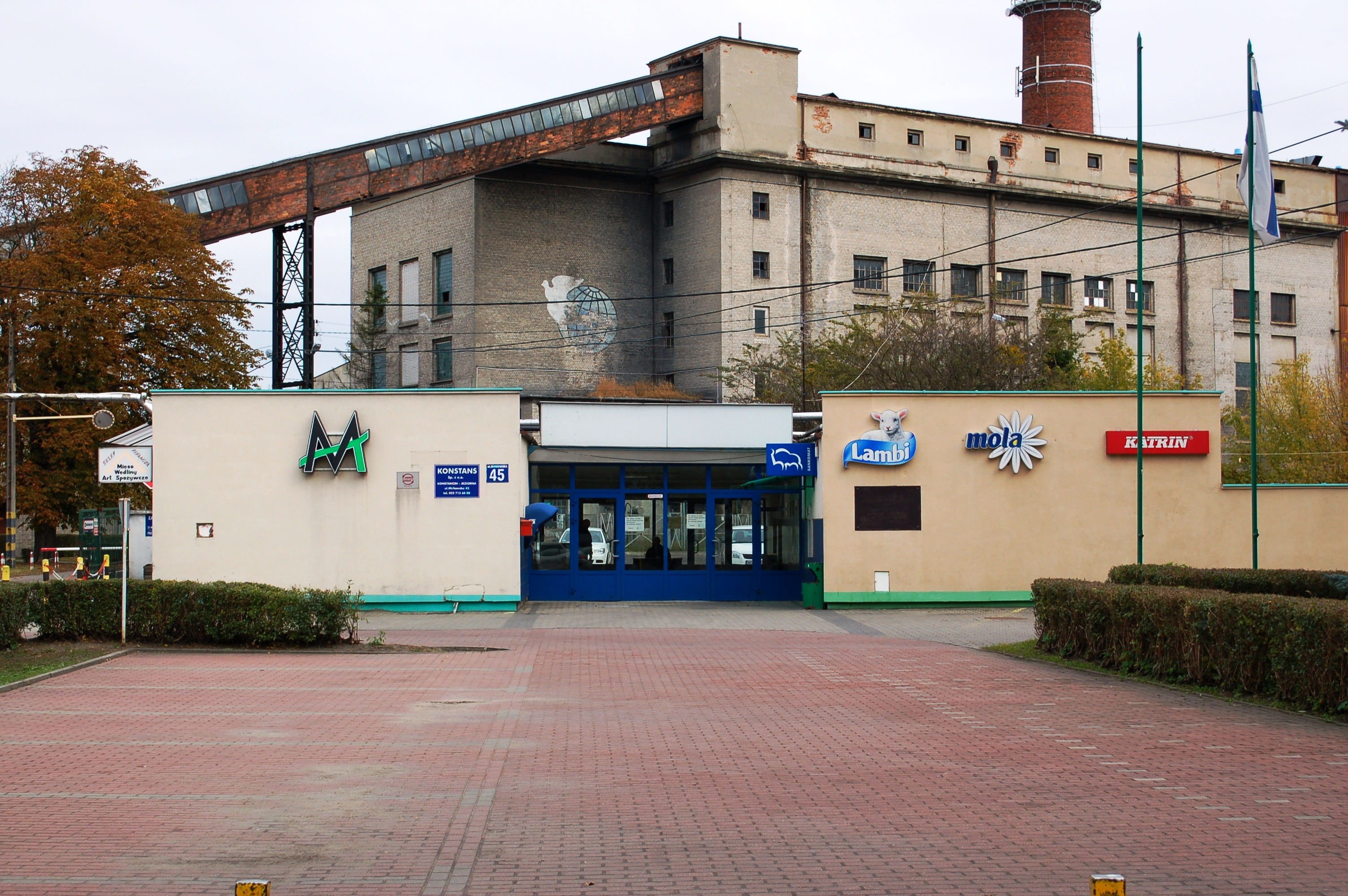 Papierfabrik Konstancin-Jeziorna, Konstans Sp.z o.o. (Metsä-Tissue)